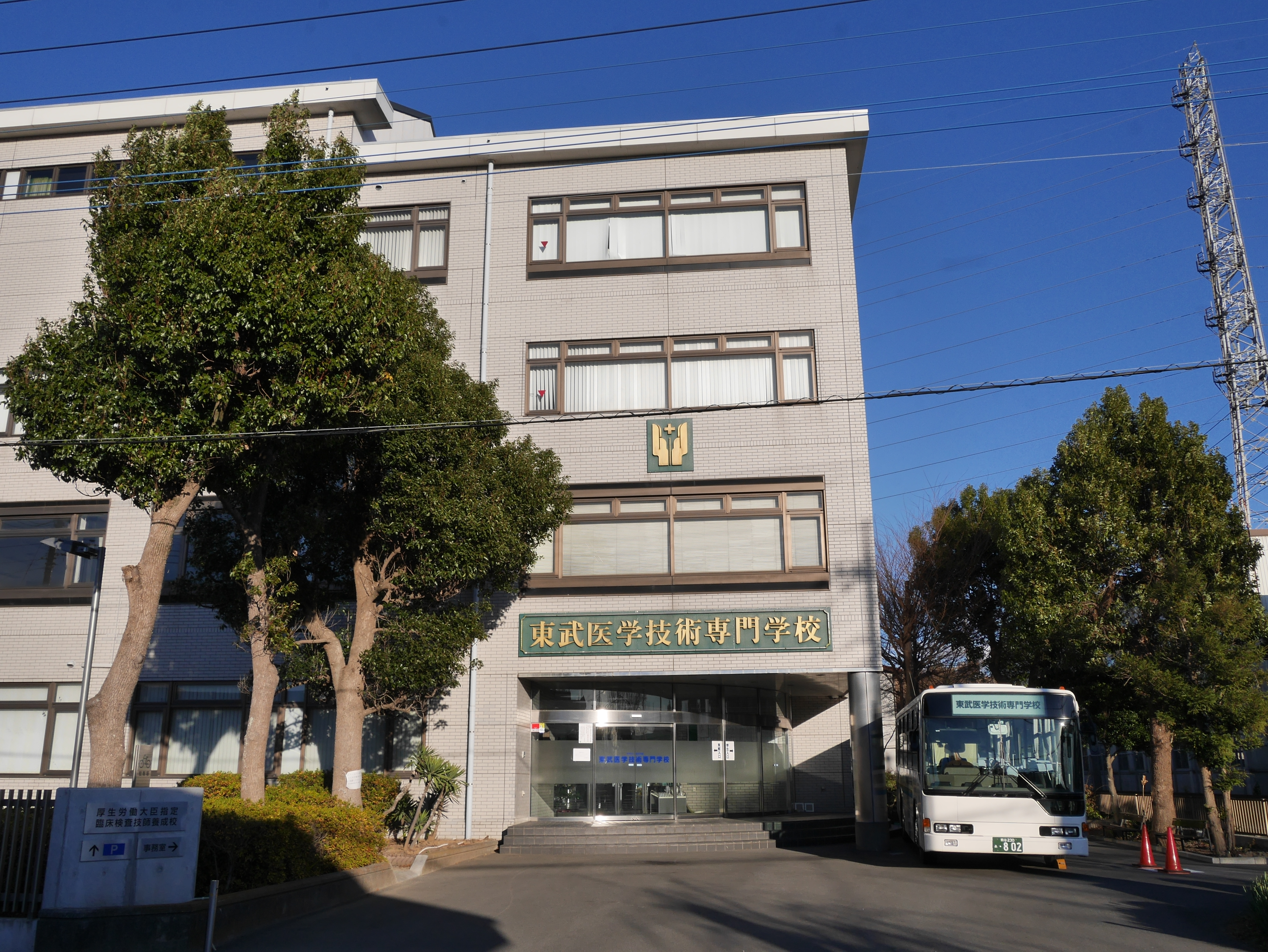 東武医学技術専門学校